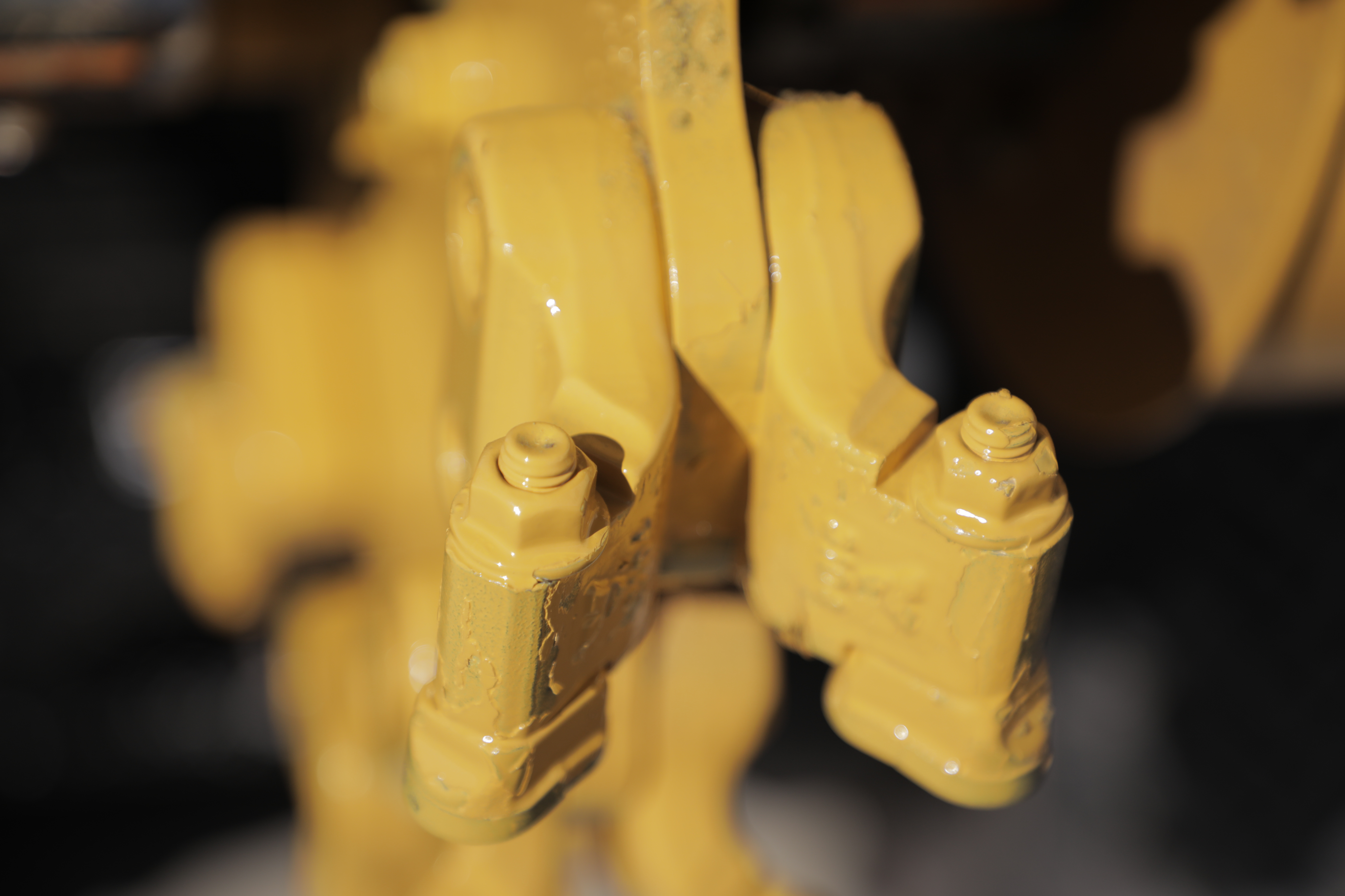 Fräständer Vermeer stubbfräs